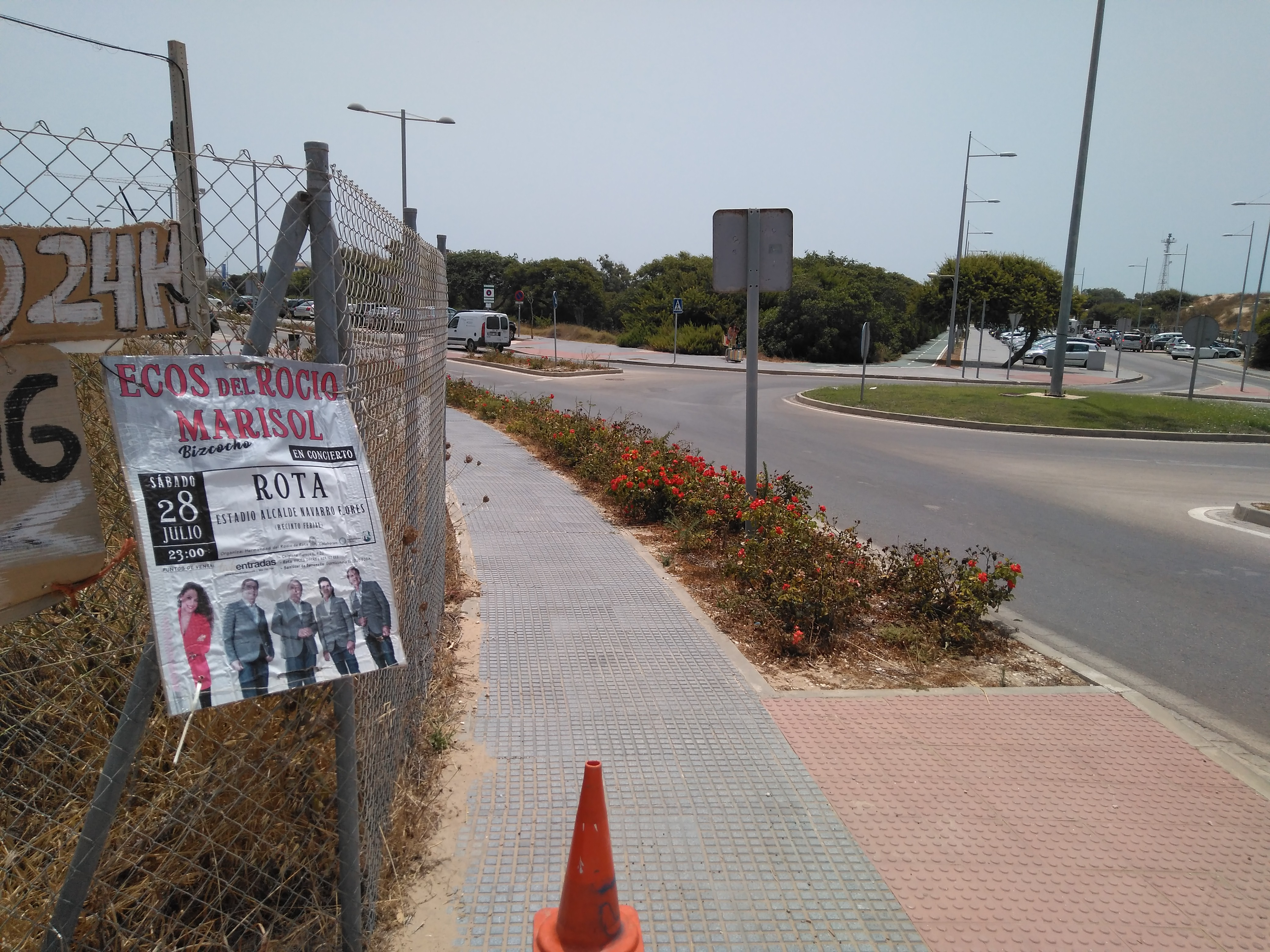 cartel anunciador de actuación del grupo "Ecos del Rocío" en Rota (España)